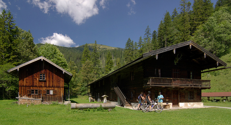 Die Winterstuben im Kloaschertal südwestlich von Bayrischzell.